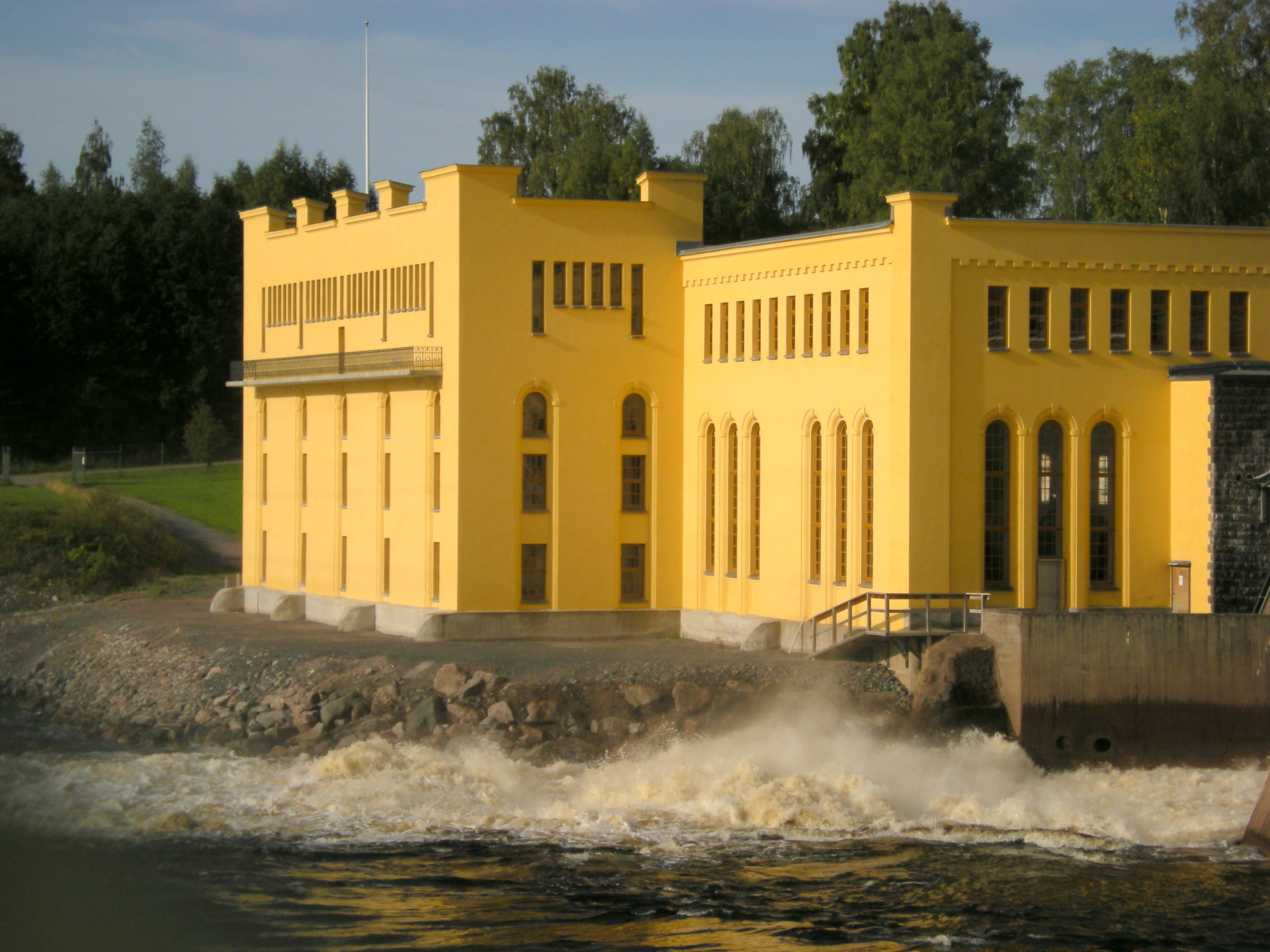 Bullerforsen, gamla kraftstationen, Borlänge, Dalälven